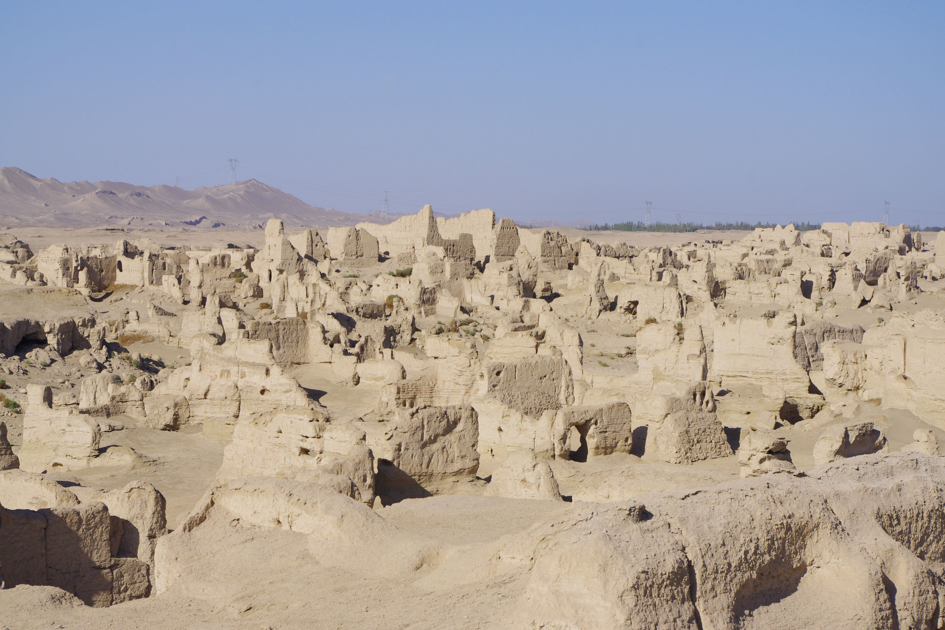 吐鲁番交河故城遗址